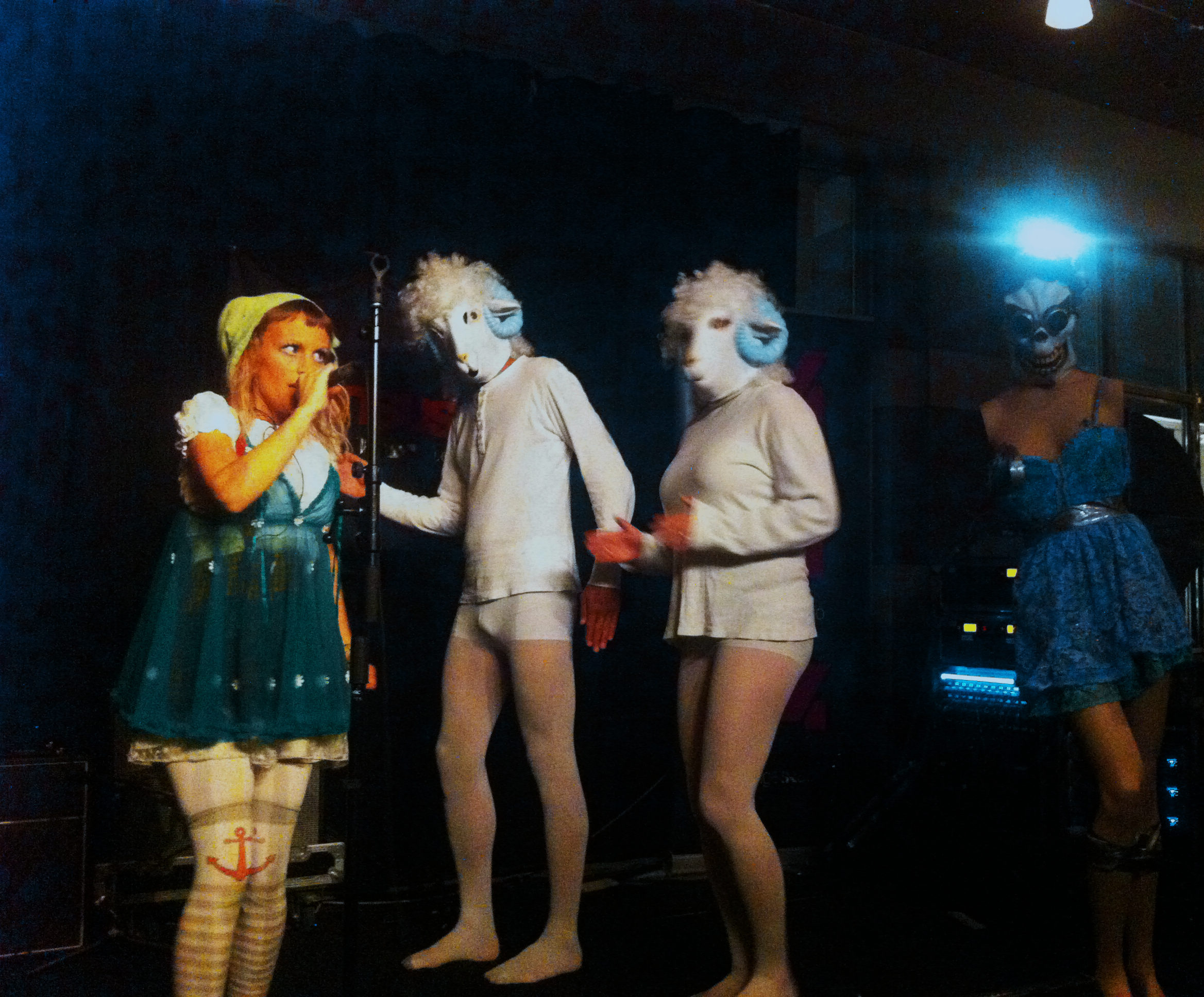 Solblomma Live at Heart-festivalen 2014